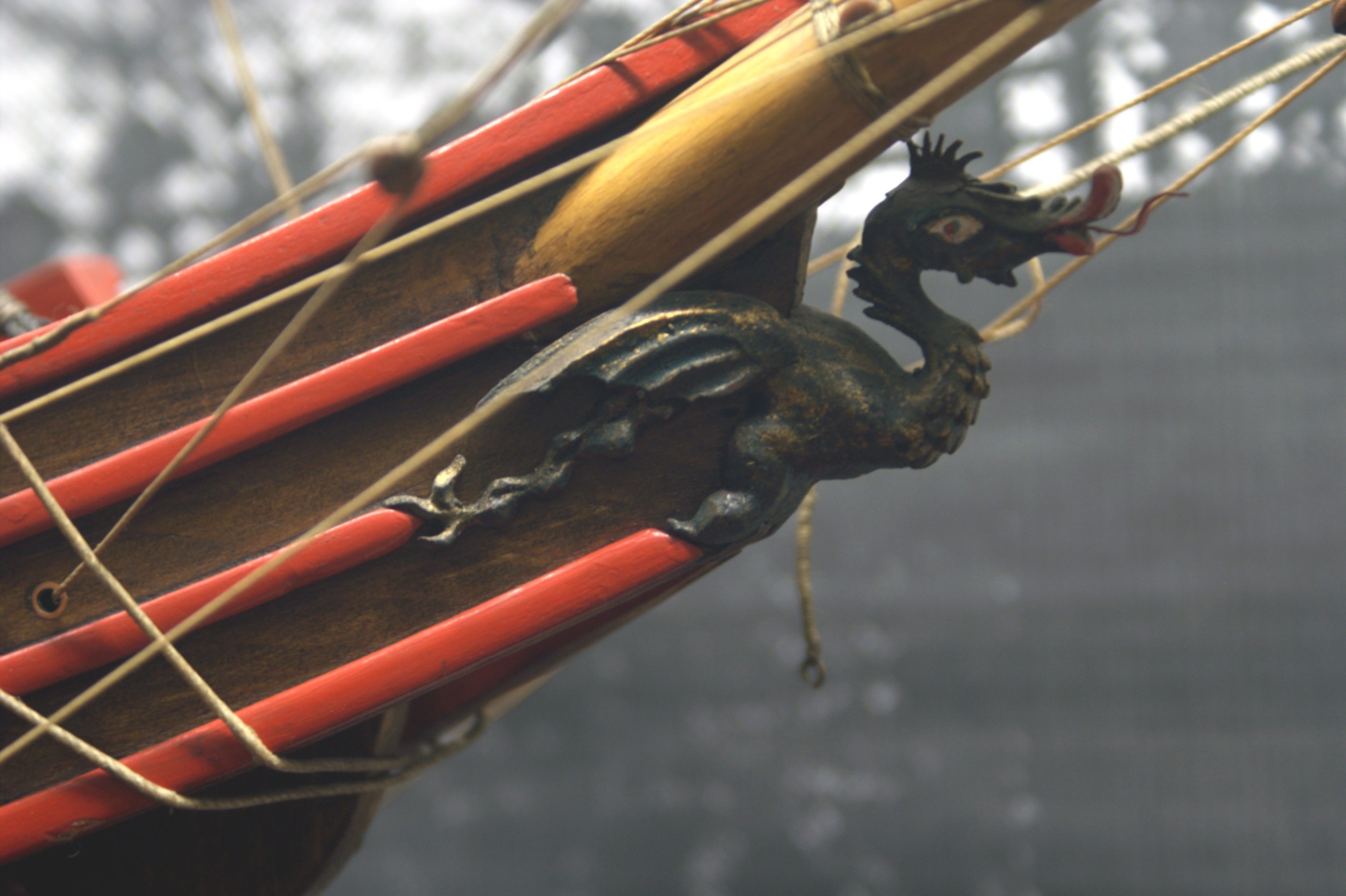 Próba rekonstrukcji galeonu Smok w Centralnym Muzeum Morskim w Gdańsku.